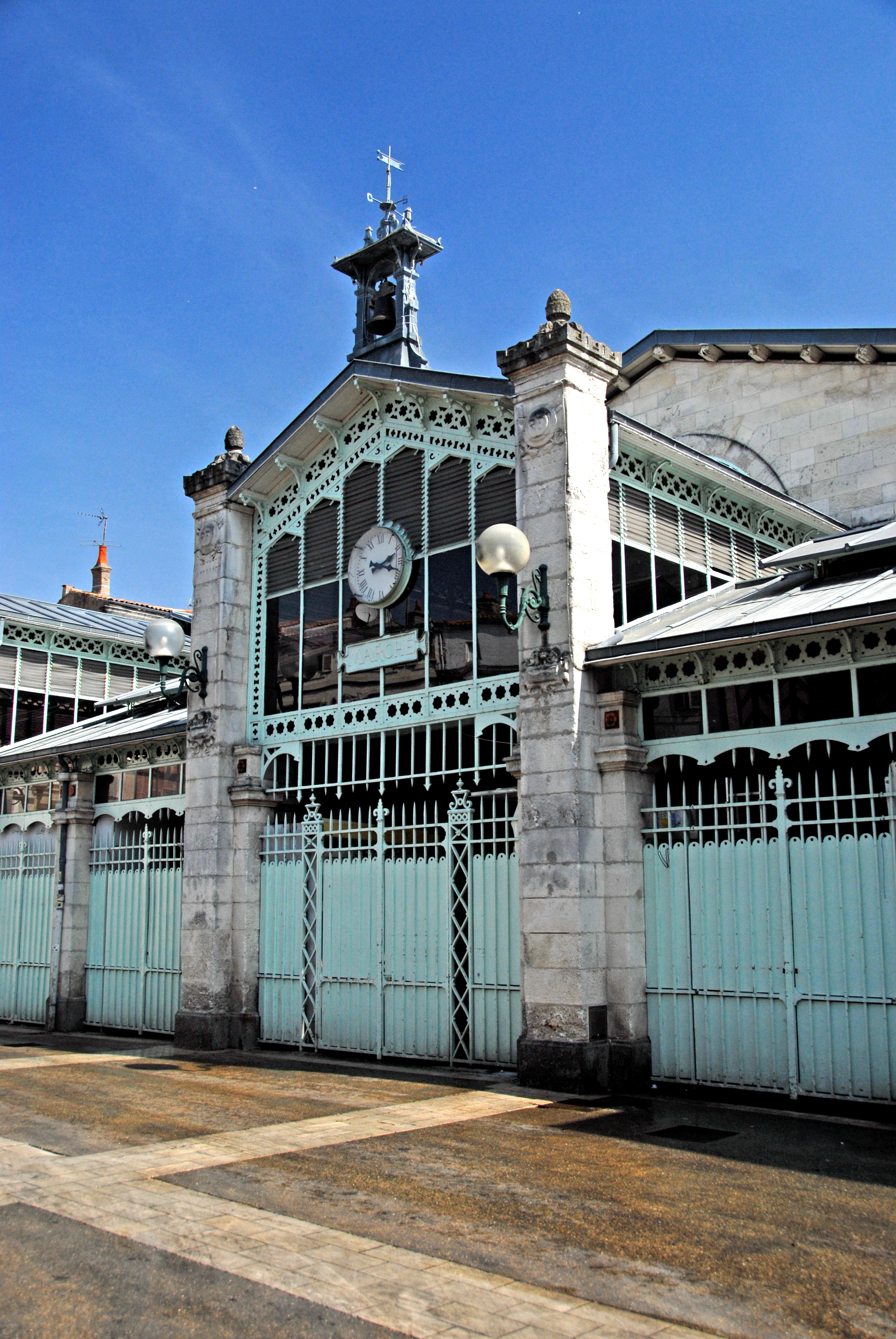 La Rochelle, Halles, Markthalle